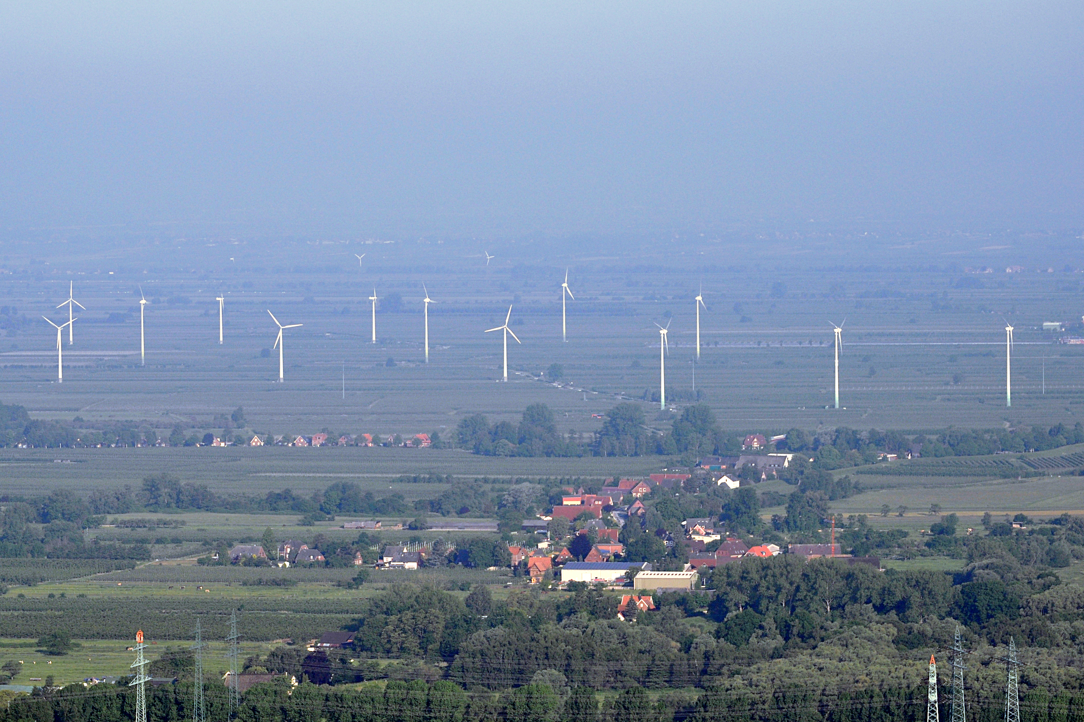 Windräder in Hamburg-Francop.